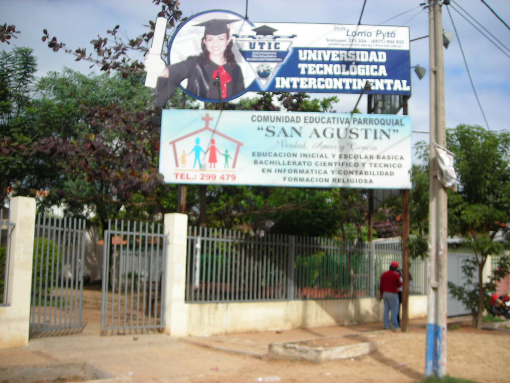 zona